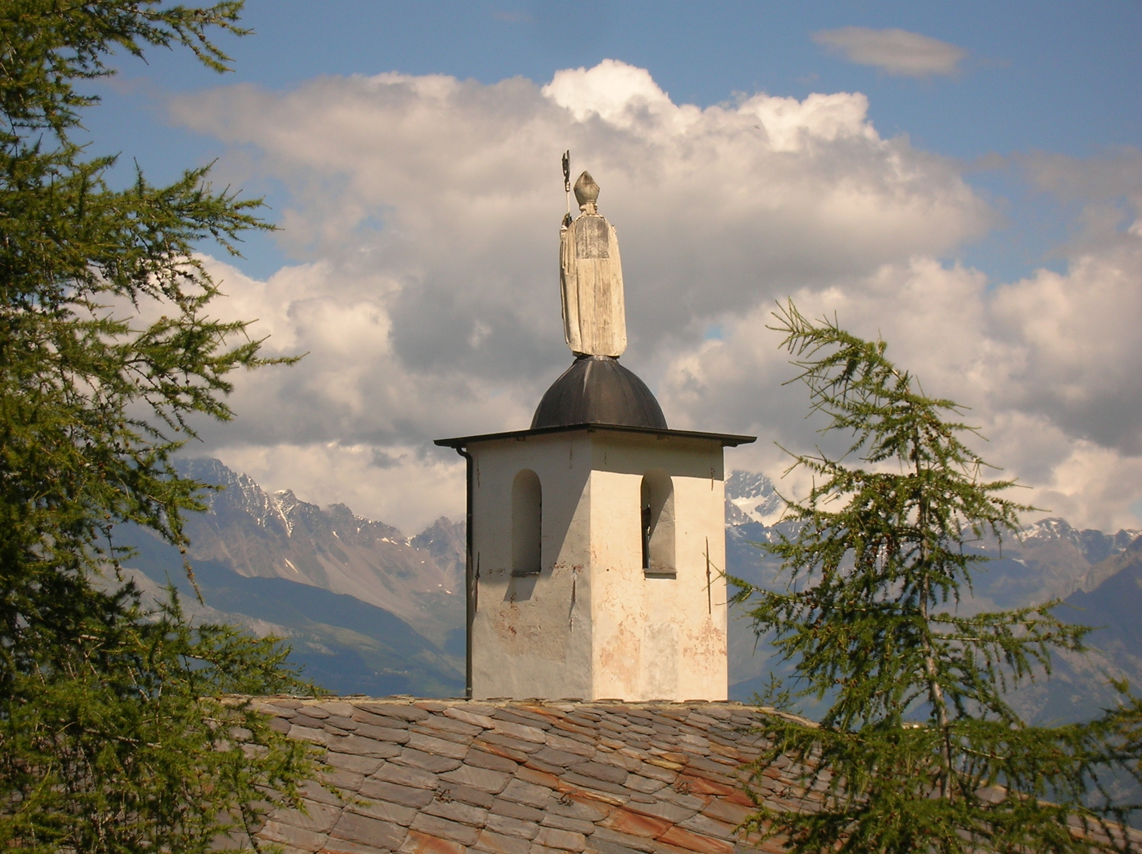 Eremo di San Grato o Cappella di San Grato - Bosco di Pila, Valle d'Aosta, Italia.